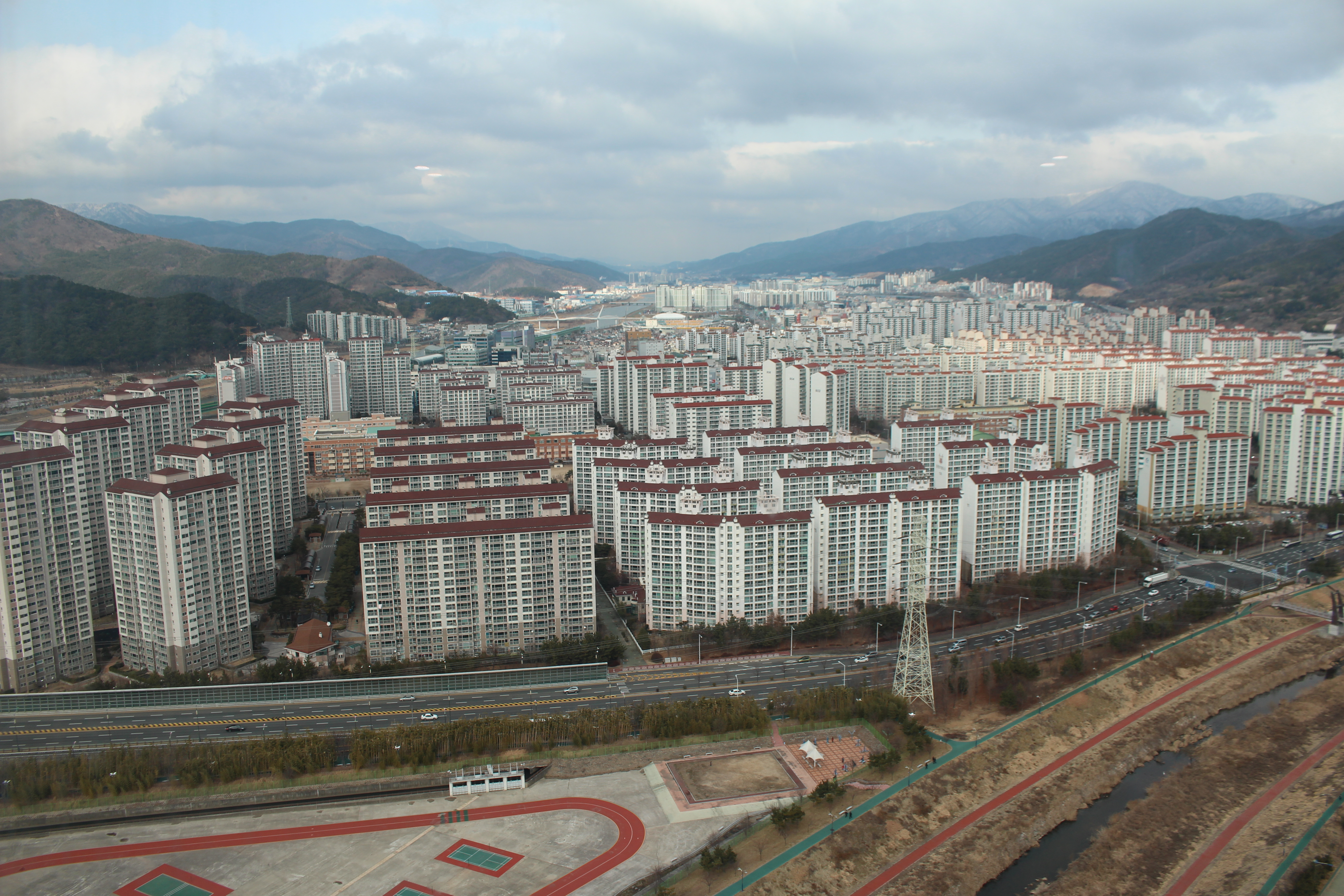 양산신도시